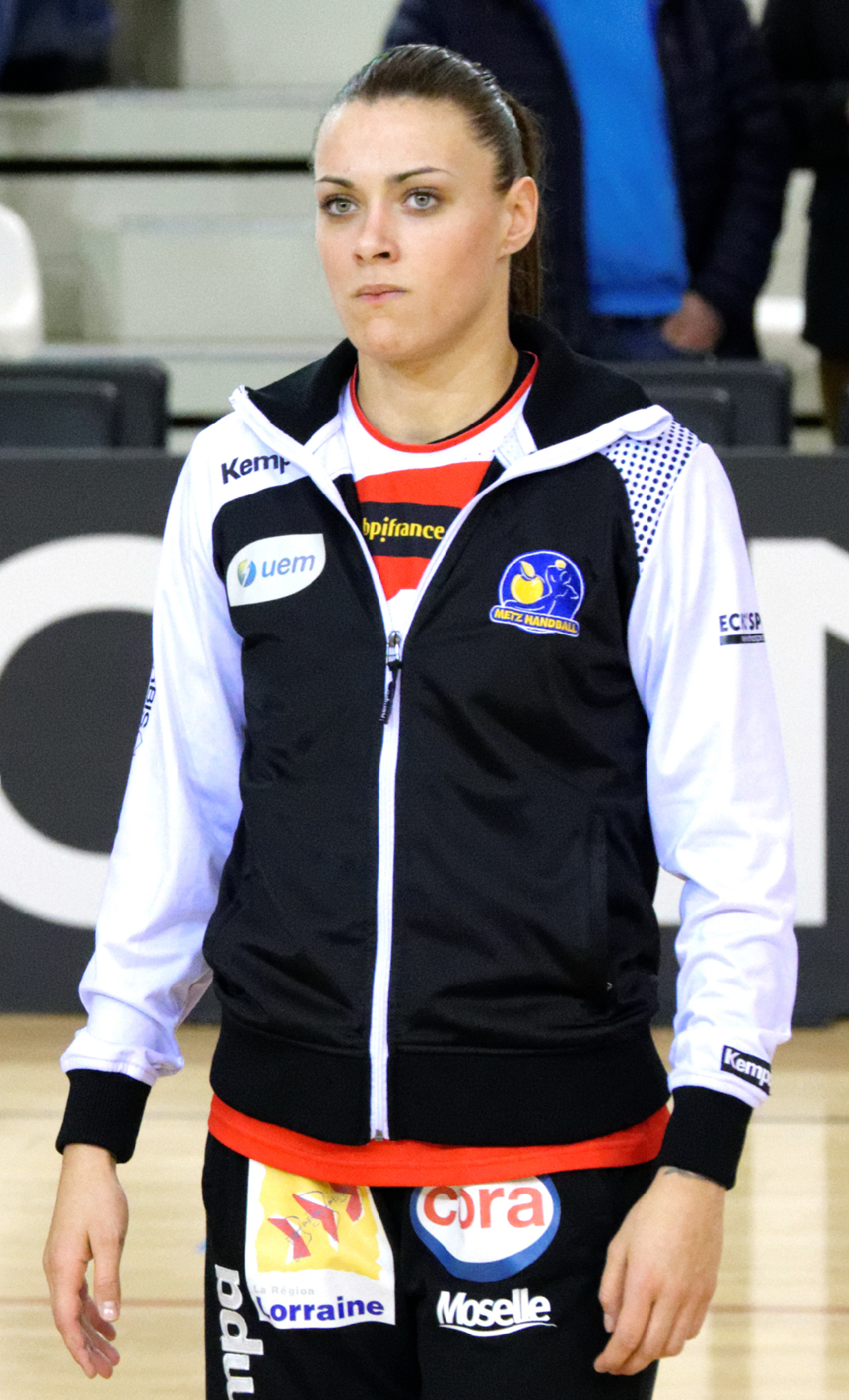 Laura Glauser , le 31 janvier 2016 lors du match Issy Paris Hand / Metz Handball pour le compte de la 14e journée. Au stade Robert Carpentier à Issy-les-moulineaux.